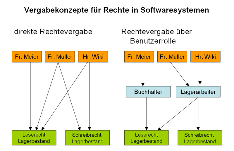 Konzept Benutzerrolle